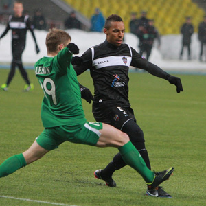 Valdo, en el partit de tornada d'Europa League